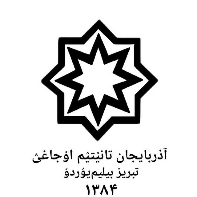 تۆرکجه: آزربایجان تانیتیم اوجاغی‌نین لوگوسو